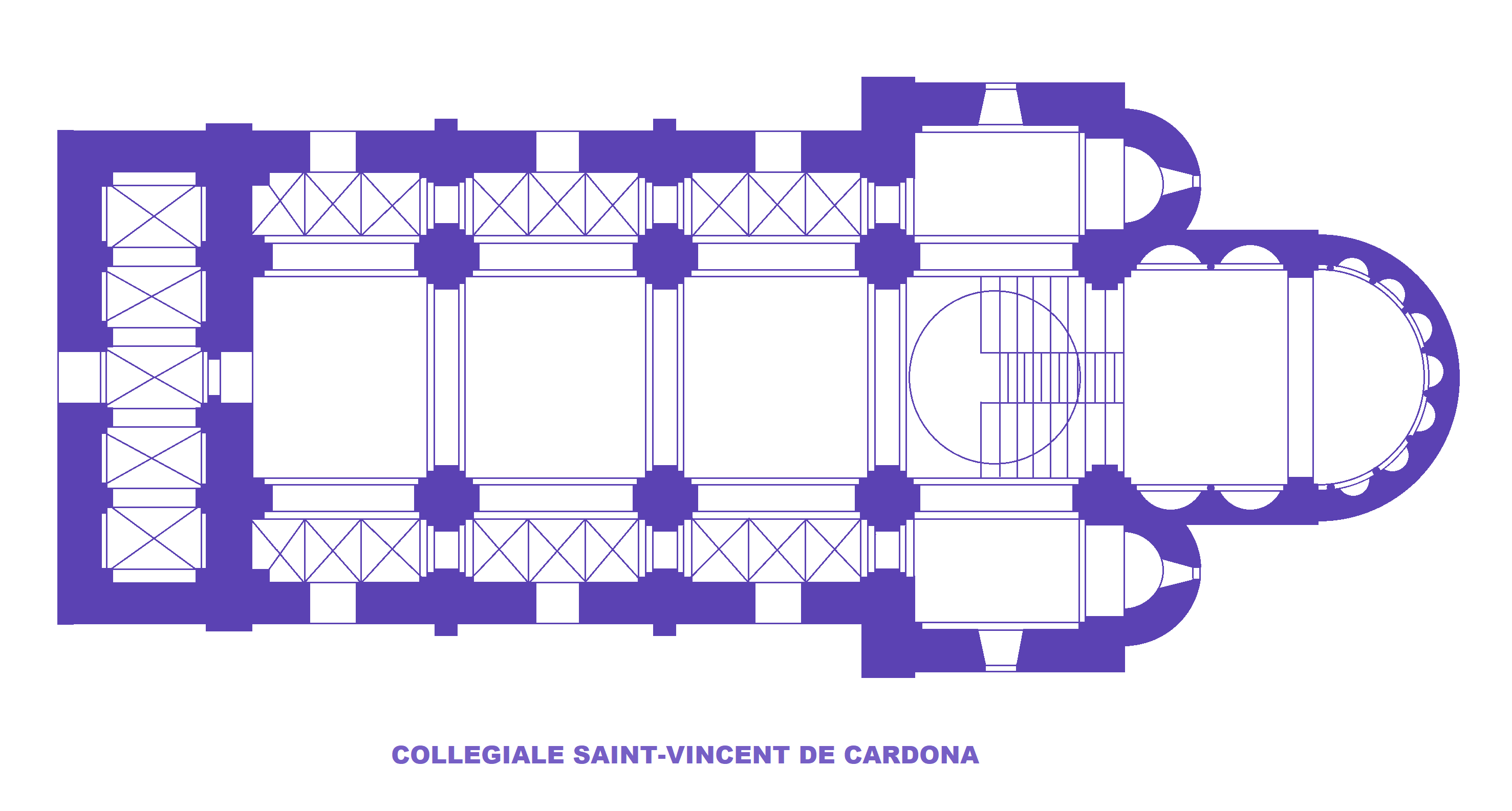 Collégiale Saint-Vincent de Cardona, Plan